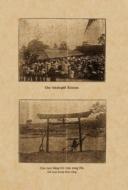 Hình ảnh chợ Kontum và cầu vượt sông Bla trên Nam Phong tạp chí số 194 ra năm 1934.